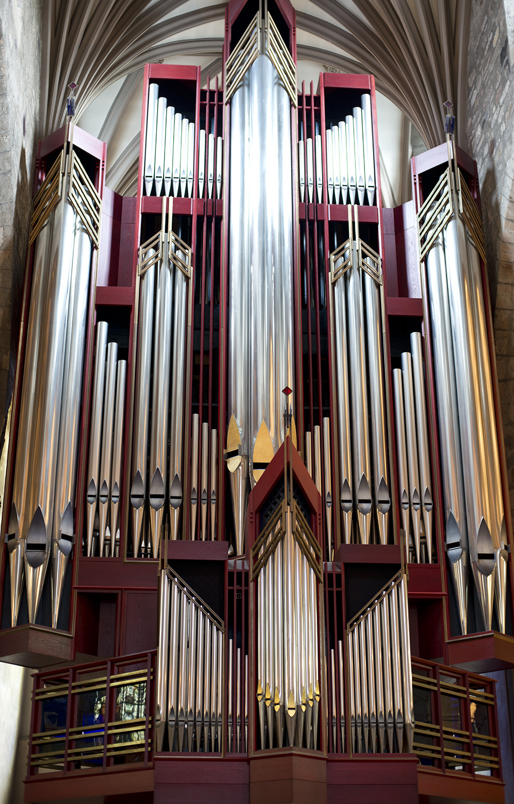 St Giles